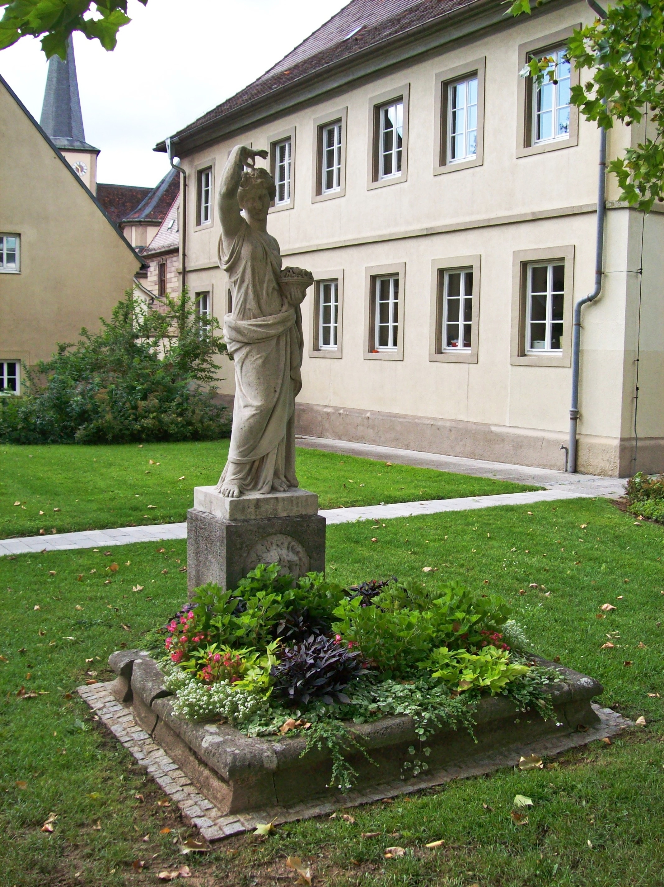 97688 Bad Kissingen, Germany